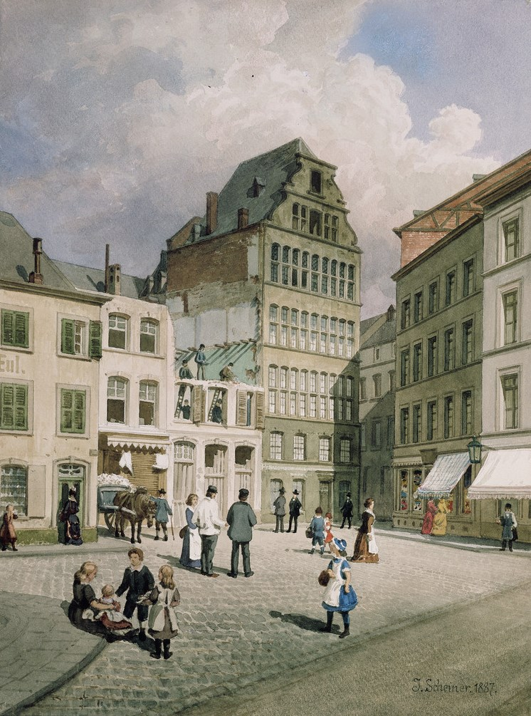 Köln Heumarkt Haus St. Peter